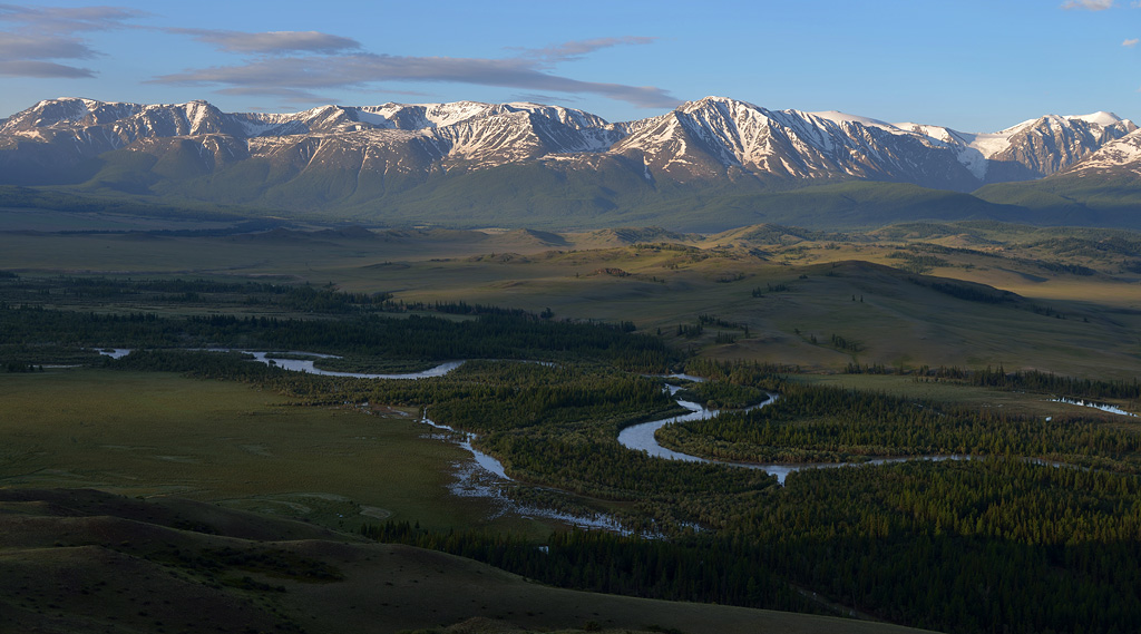 Река Чуя и Северо-Чуйский хребет на заднем плане (Горный Алтай)